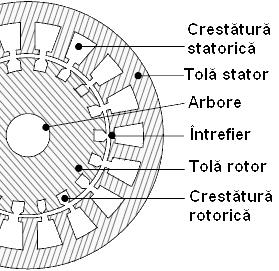 Stator şi rotor la un motor ASI